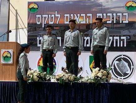 טקס החלפת מפקד המרכז לאימונים טקטיים (מא״ט) במרכז הלאומי לאימונים ביבשה. הטקס נערך במעמד מפקד המרכז הלאומי לאימונים ביבשה, תת-אלוף דוד זיני, מפקד המא״ט היוצא, אלוף משנה אוהד מאור ומפקד המא״ט הנכנס ומפקד חטיבת כרמלי, אלוף משנה ארז אלקבץ, ומפקדים נוספים במרכז הלאומי לאימונים ביבשה.